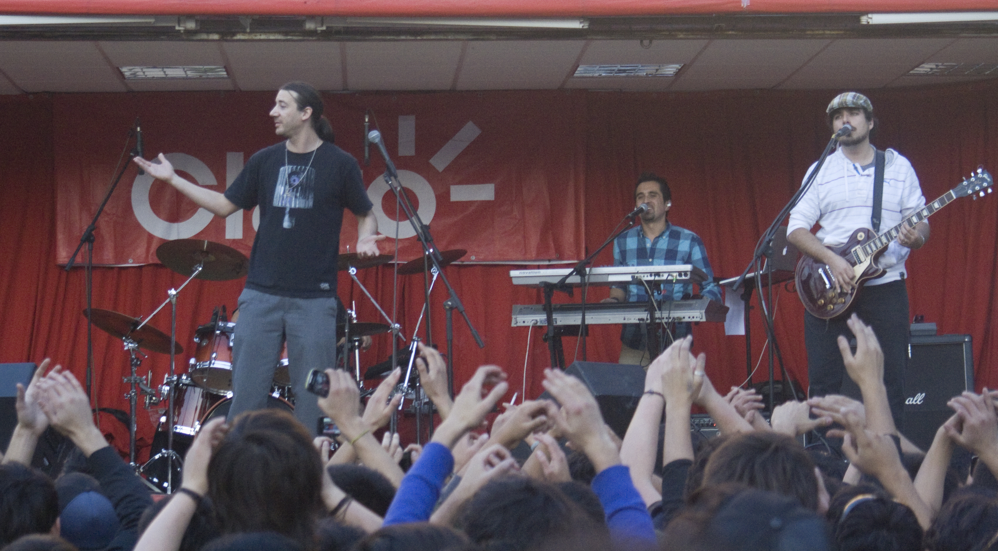 Los Tetas, banda Funk chilena